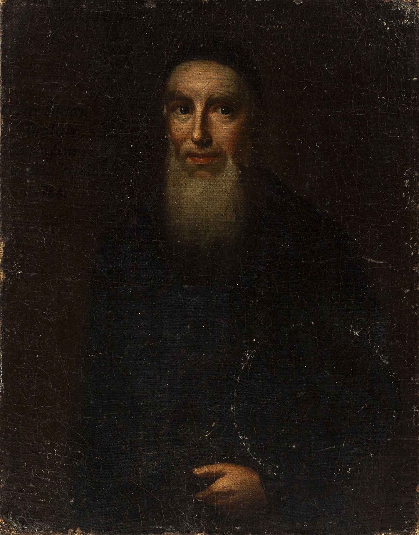 Porträtt av Per Larsson, Bondeståndets talman vid Riksdagen 1726. Avbildad av okänd konstnär ca 1730.